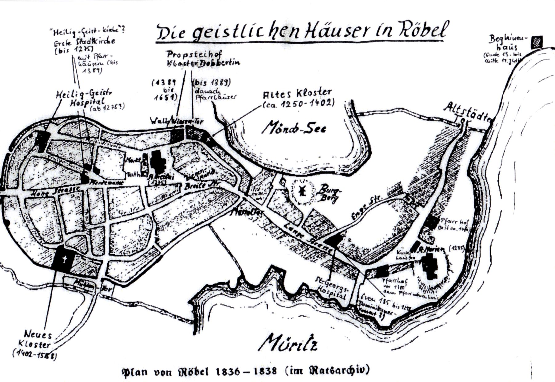 Skizze des Stadtplans von Röbel